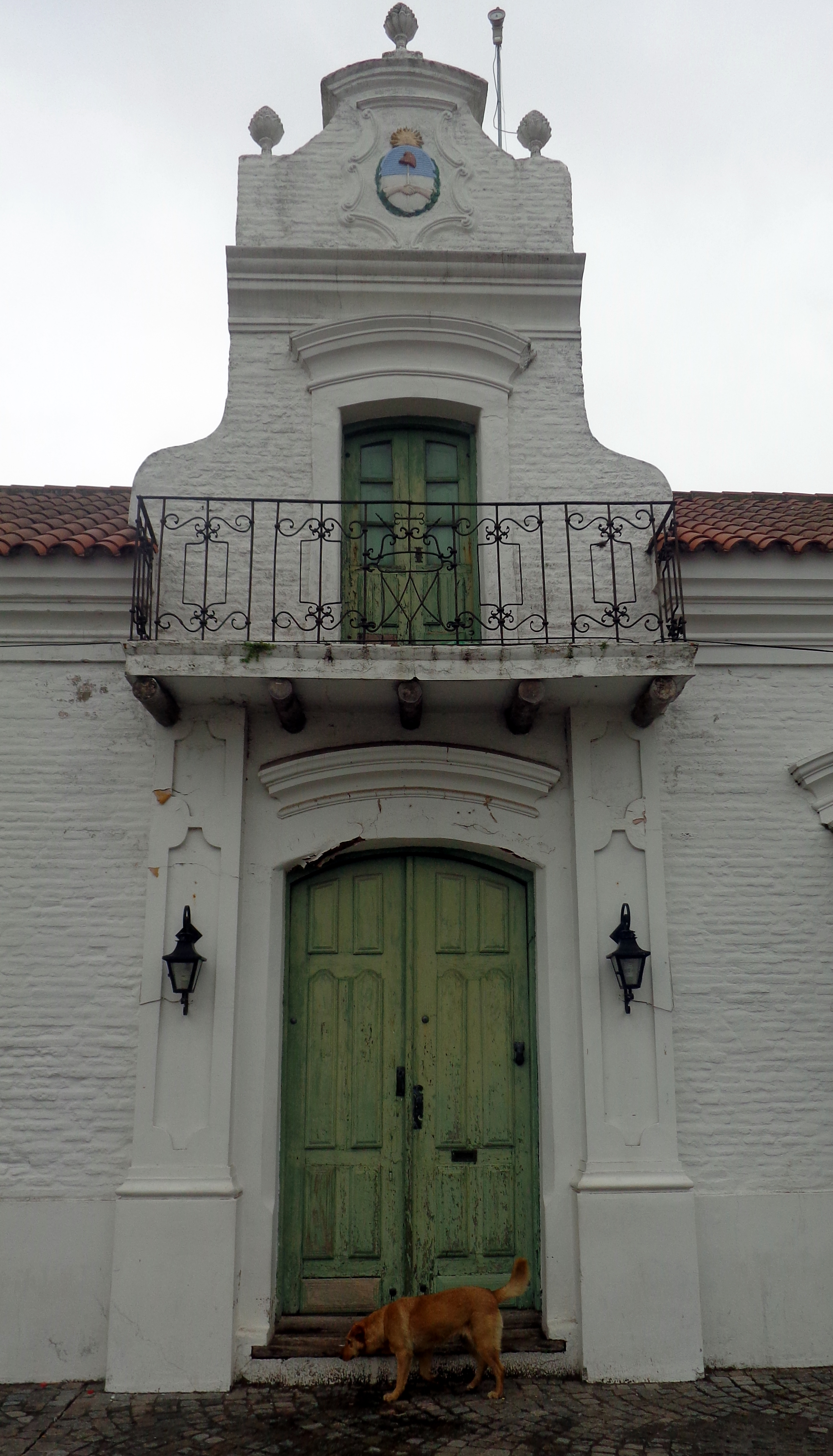 Puerta de la Casa del Virrey Sobremonte en Luján, Provincia de Buenos Aires, Argentina. Conocida también como la Casa de la Esquina.